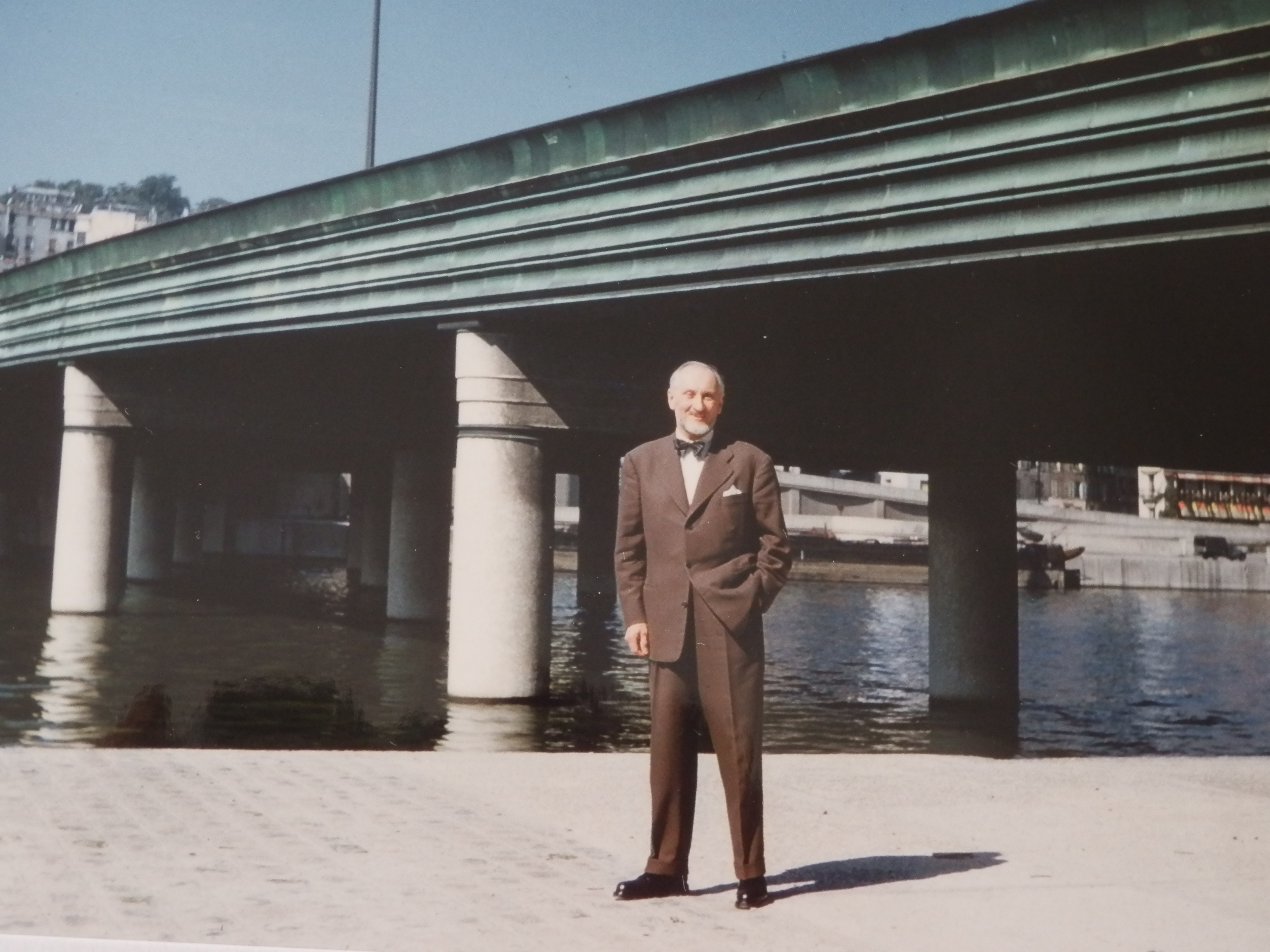 L'architecte Théo Sardnal devant le pont de Saint-Cloud qu'il a construit